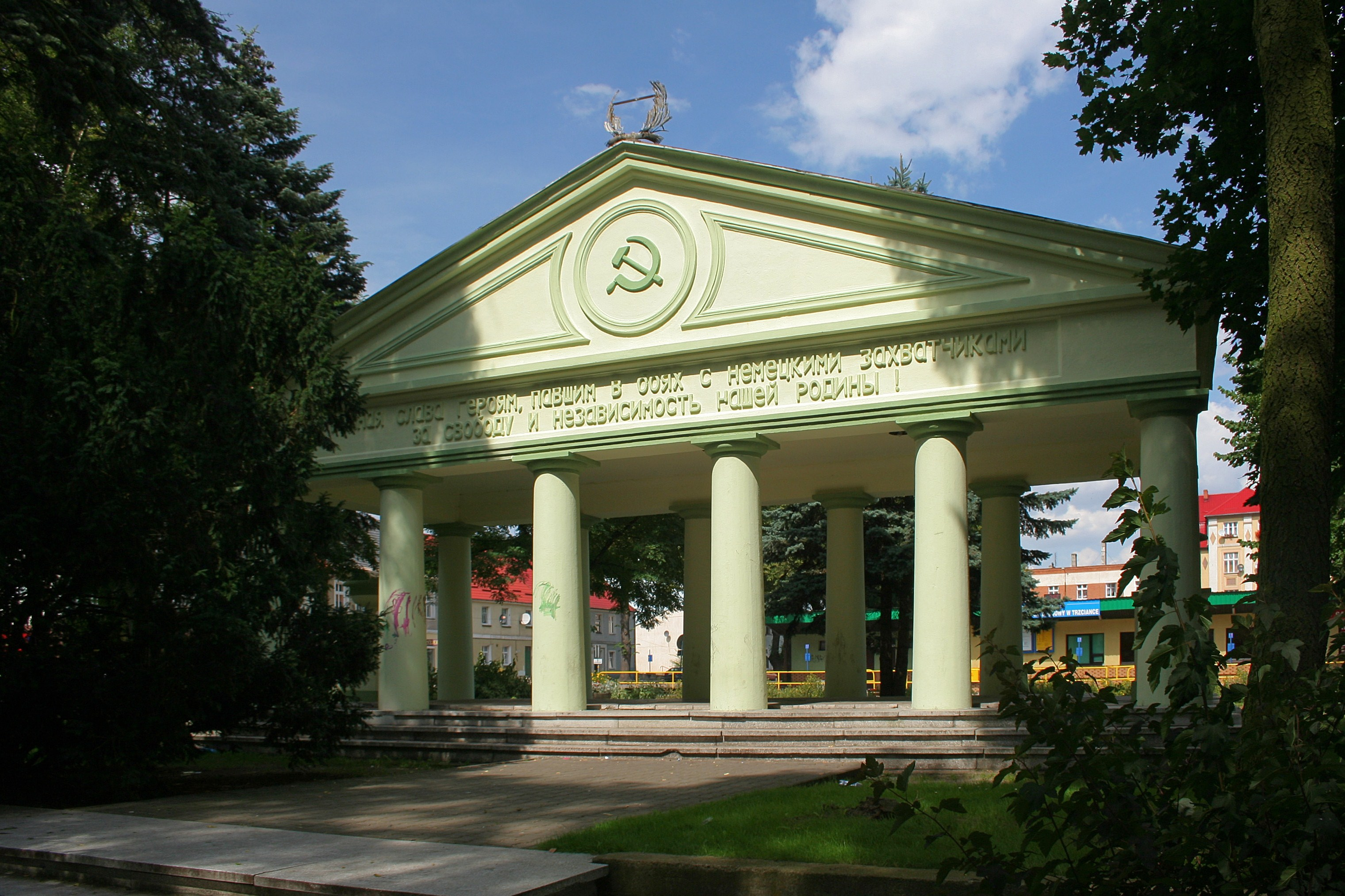 Grób żołnierzy radzieckich w Trzciance.